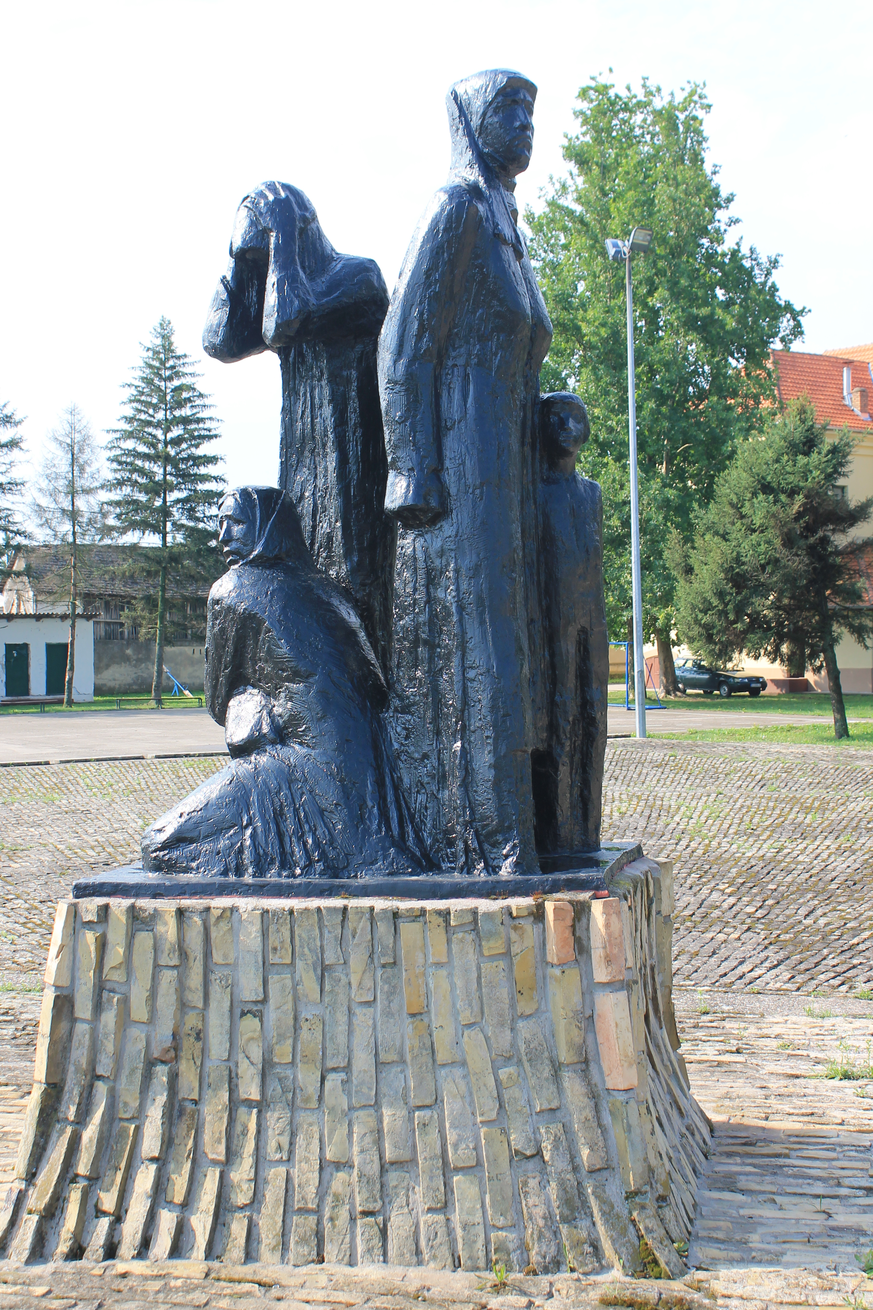 Jamena-spomenik nastradalima stanovnicima iz Drugog svetskog rata